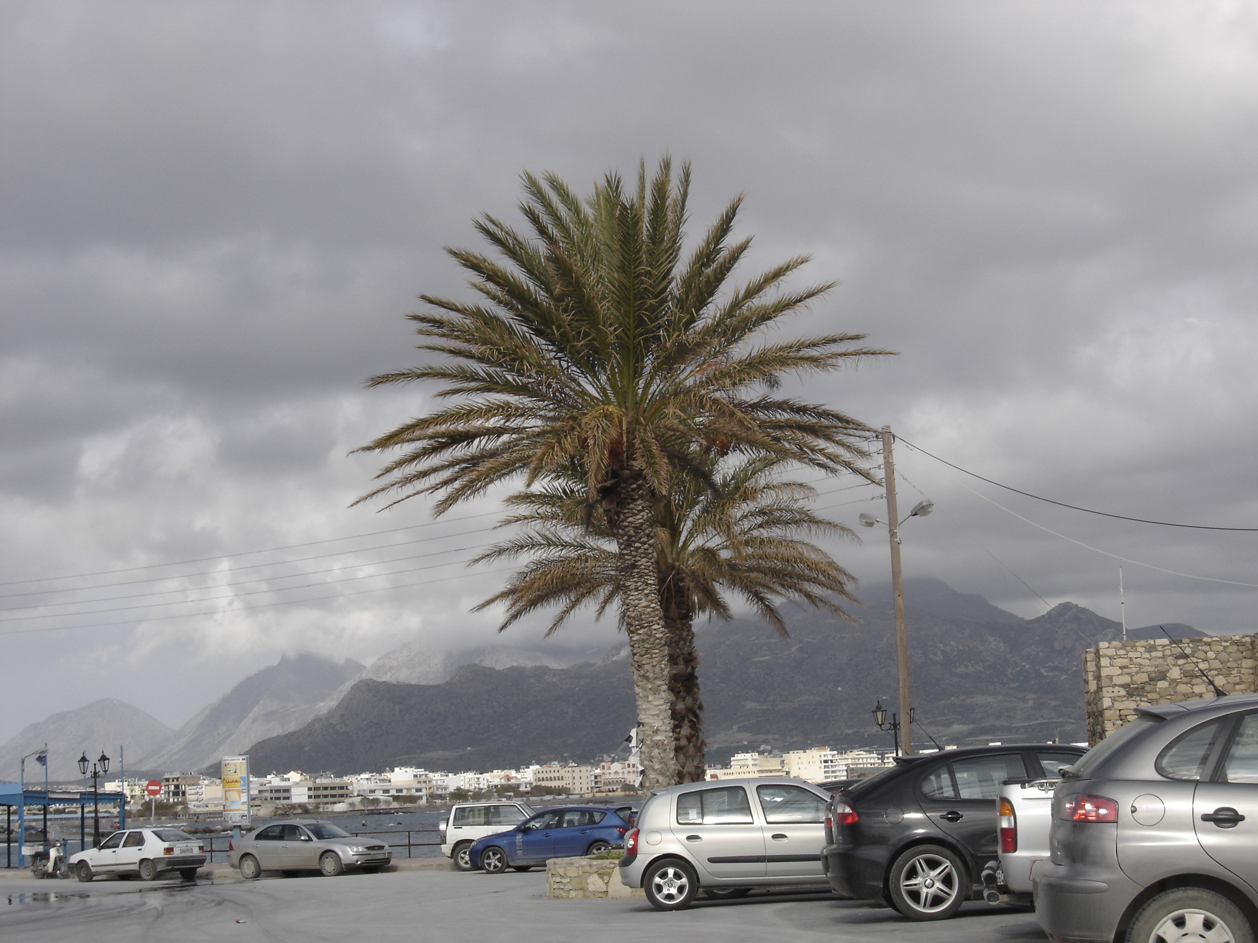 The port of Ierapetra. Βόρεια του Καλέ (φρούριο της ιεράπετρας). Είναι σπάνιο να πετύχετε την Ιεράπετρα συνεφιασμένη. Απο τον δρόμο αριστερά πάτε στις ψαροταβέρνες. Αριστερά βρίσκετε η Κάτω μερά και το σπίτι του ναπολέοντα (μέσα στα στενά).